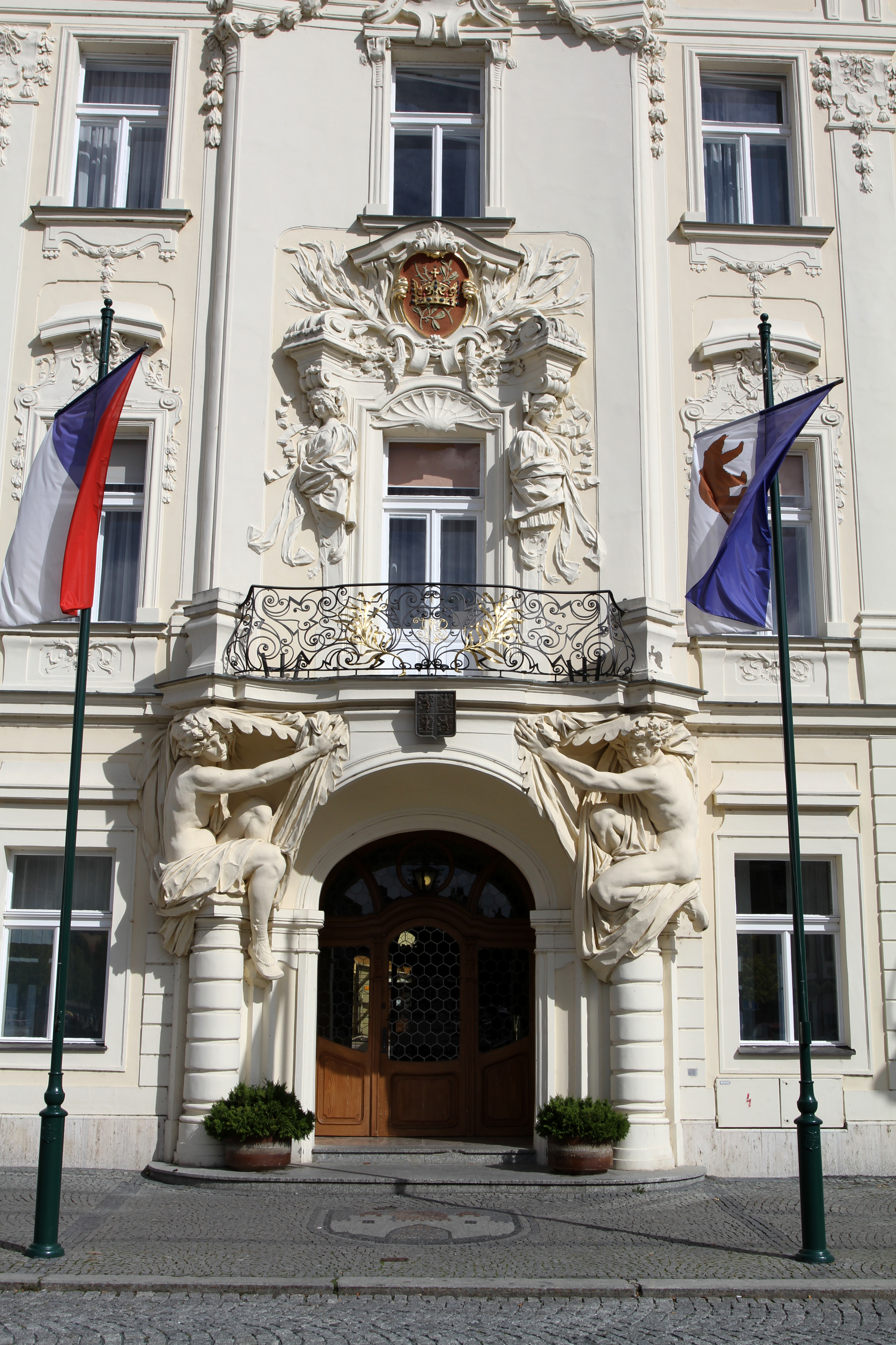 Radnice (Beroun), Husovo nám. 68/1, Beroun